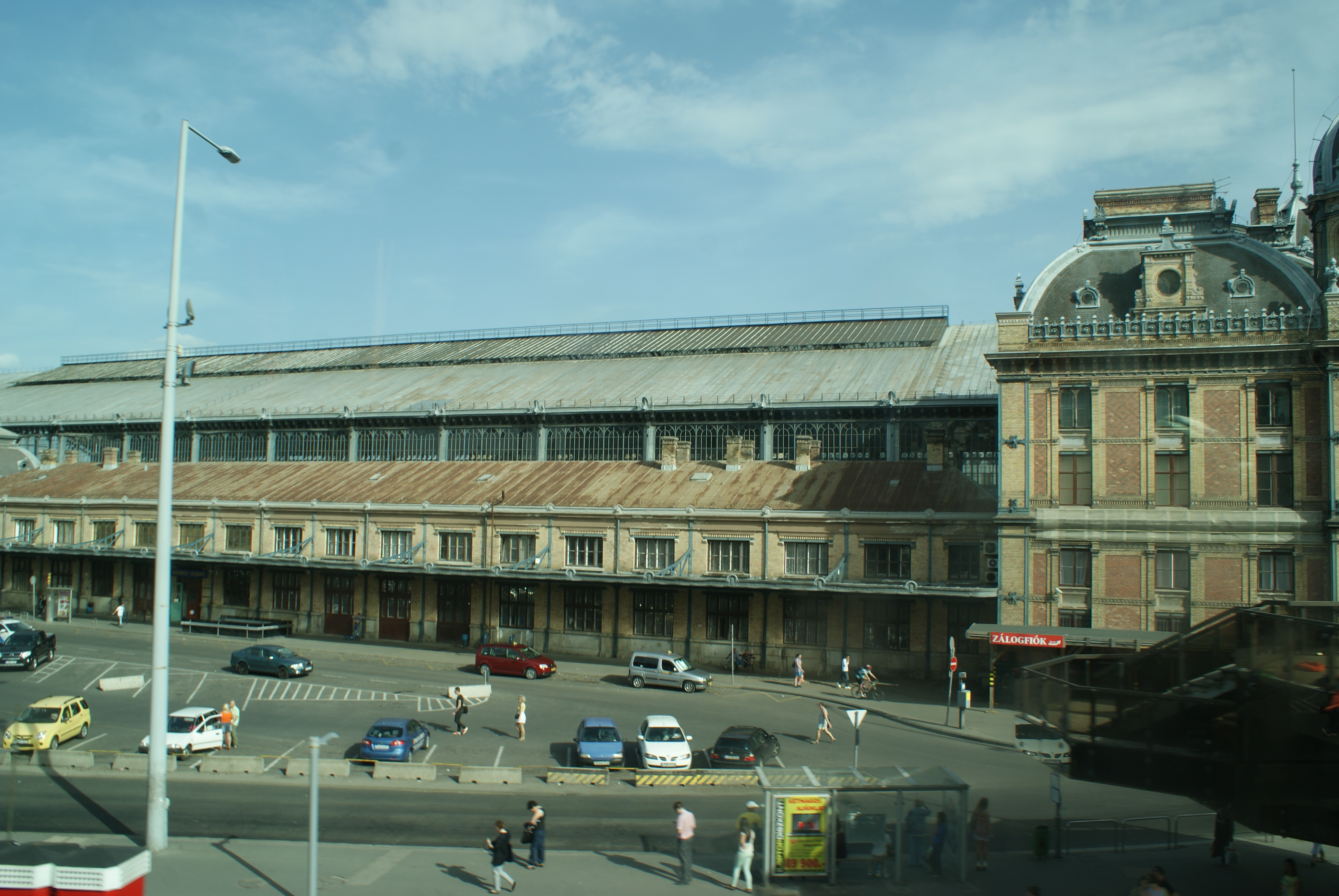 Budapest-Nyugati pályaudvar